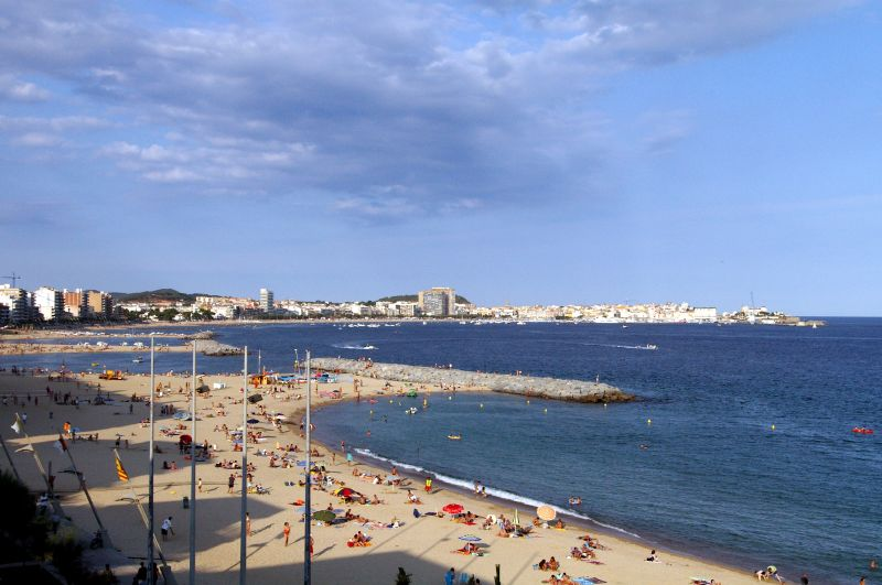 Beach of Sant Antoni de Calonge, Catalunya, Catalan Countries